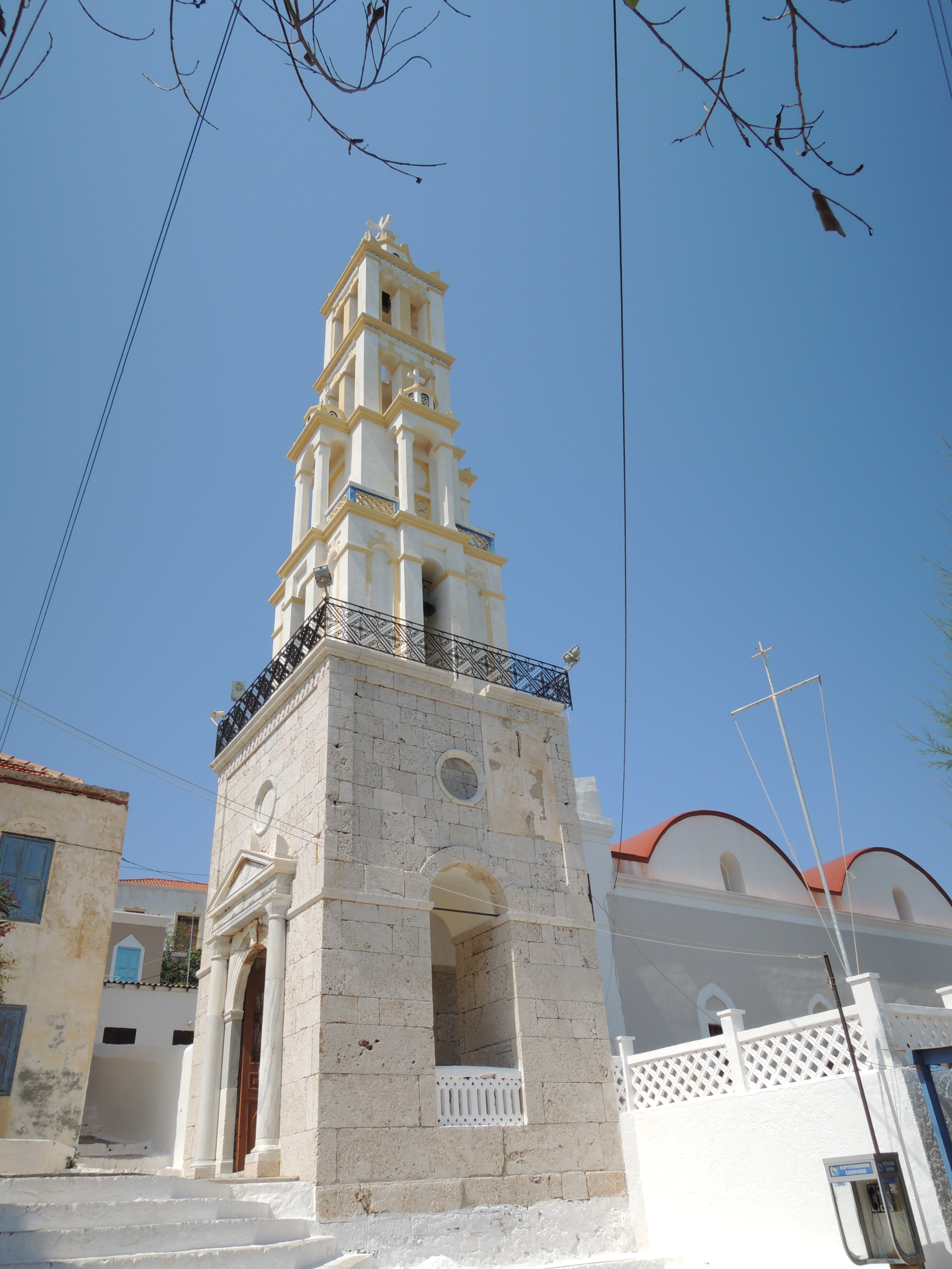 Халки. Церковь Св. Николая, вид с улицы